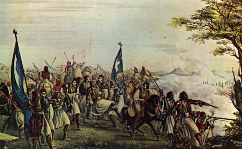 Ο θάνατος του Καραϊσκάκη